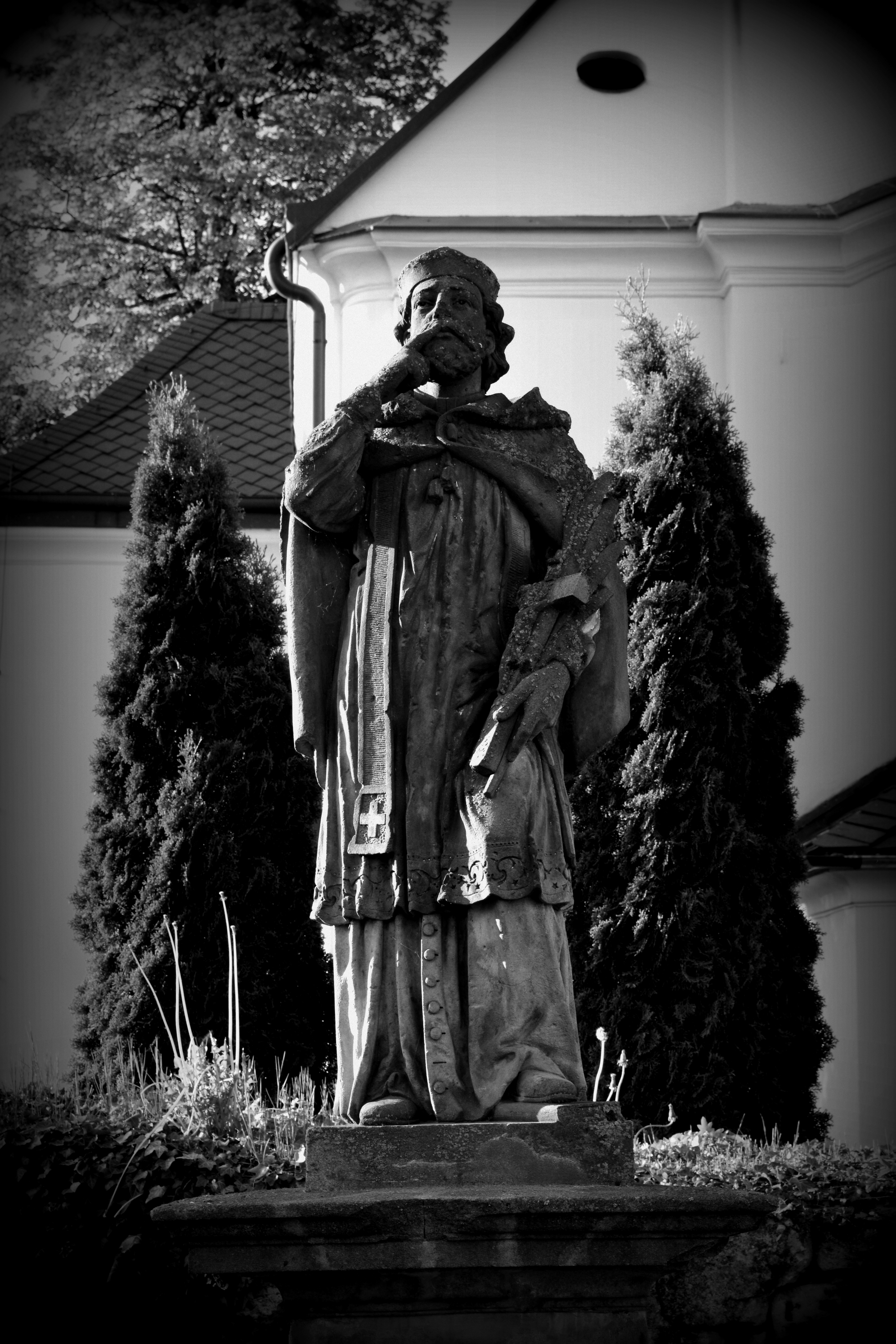 Čermná ve Slezsku, socha sv. Jana Nepomuckého stojící před kostelem sv. Markéty.